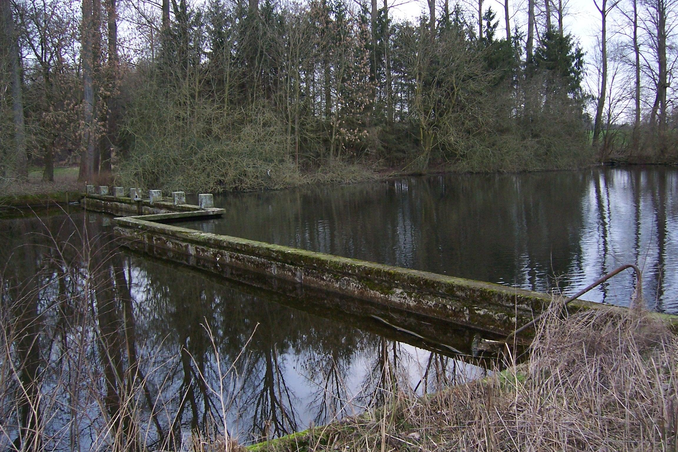 Ehemaliges Freibad Nünningsmühle, betrieben von 1936-1962 (ca.), Steinfurt-Borghorst, Kreis Steinfurt, NRW, Germany.